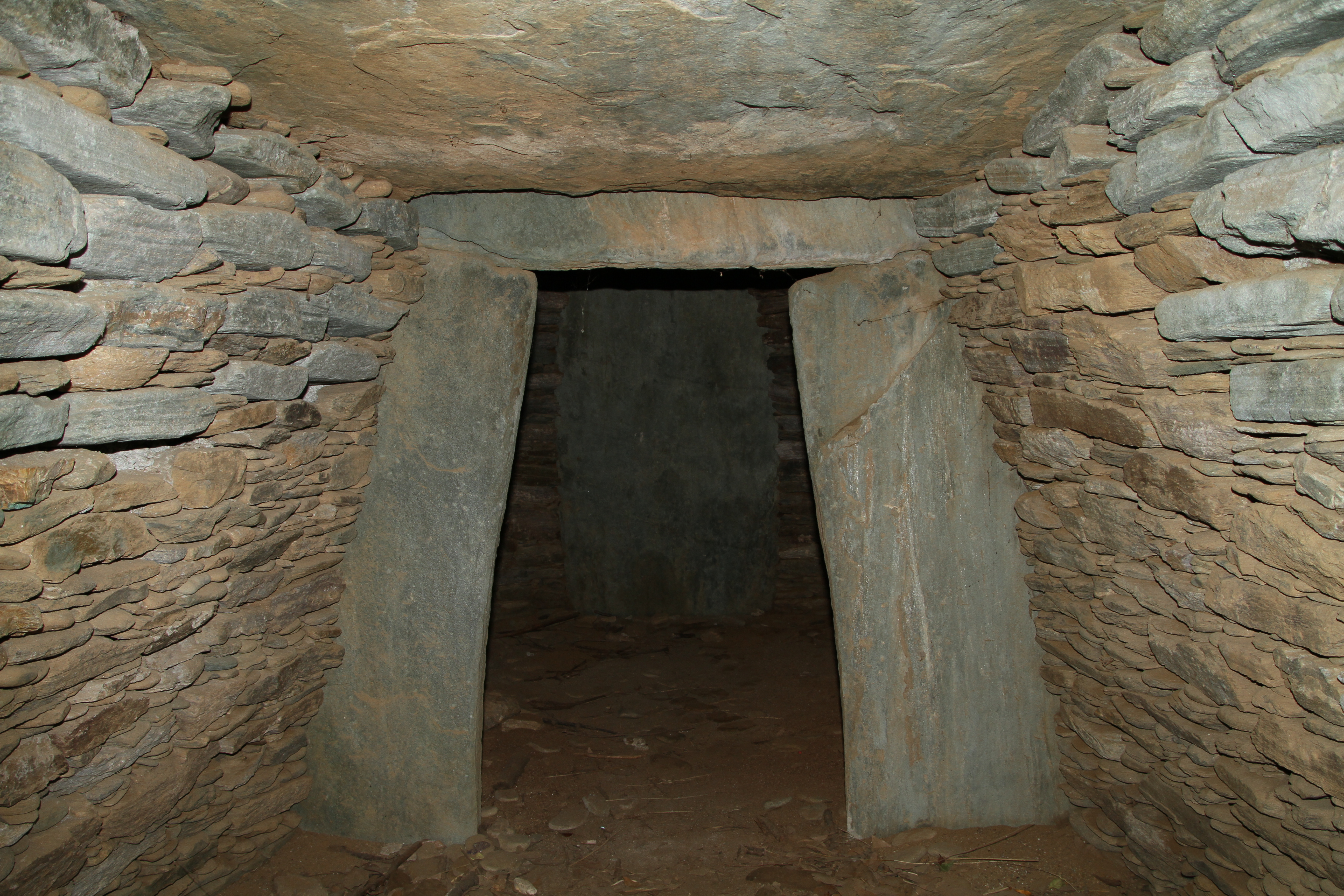 稲荷塚古墳(嵐山町)の横穴式石室